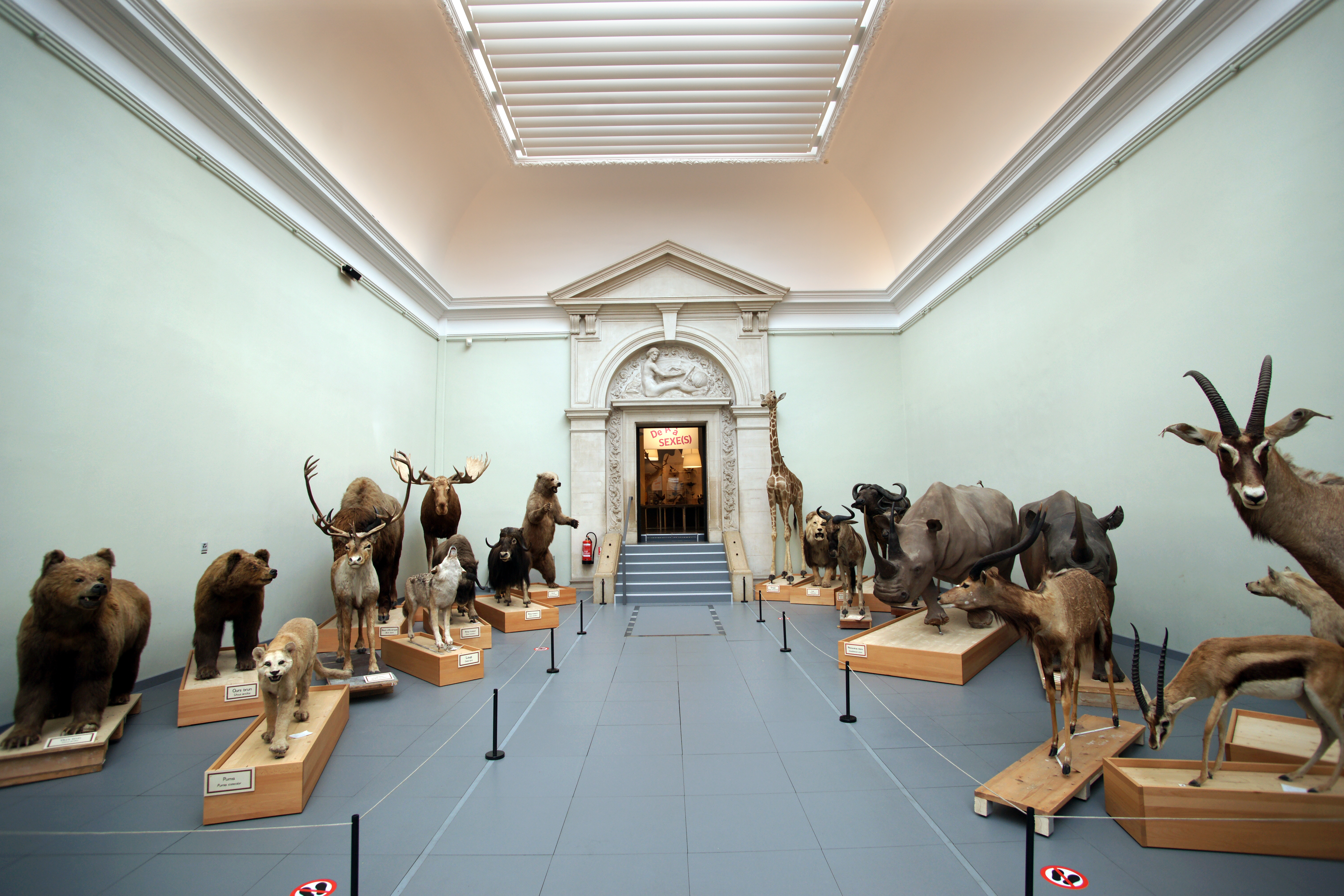 Palazzo di Rumine The making of this document was supported by Wikimedia CH. (Submit your project!) For all the files concerned, please see the category Supported by Wikimedia CH.